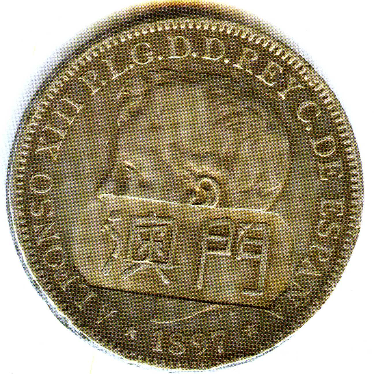 Moneda con resello empleada en Macao